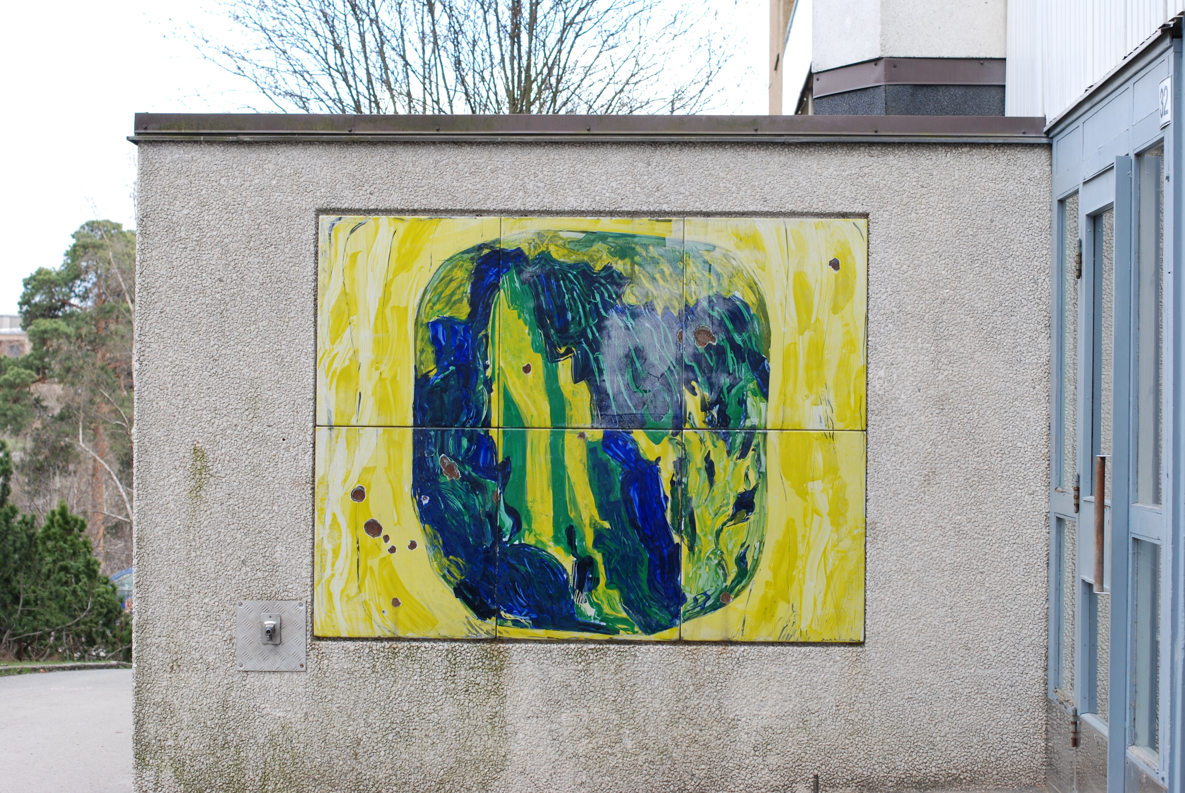 Enamel painting by Birgitta Charlez in Östberga, Stockholm, Sweden